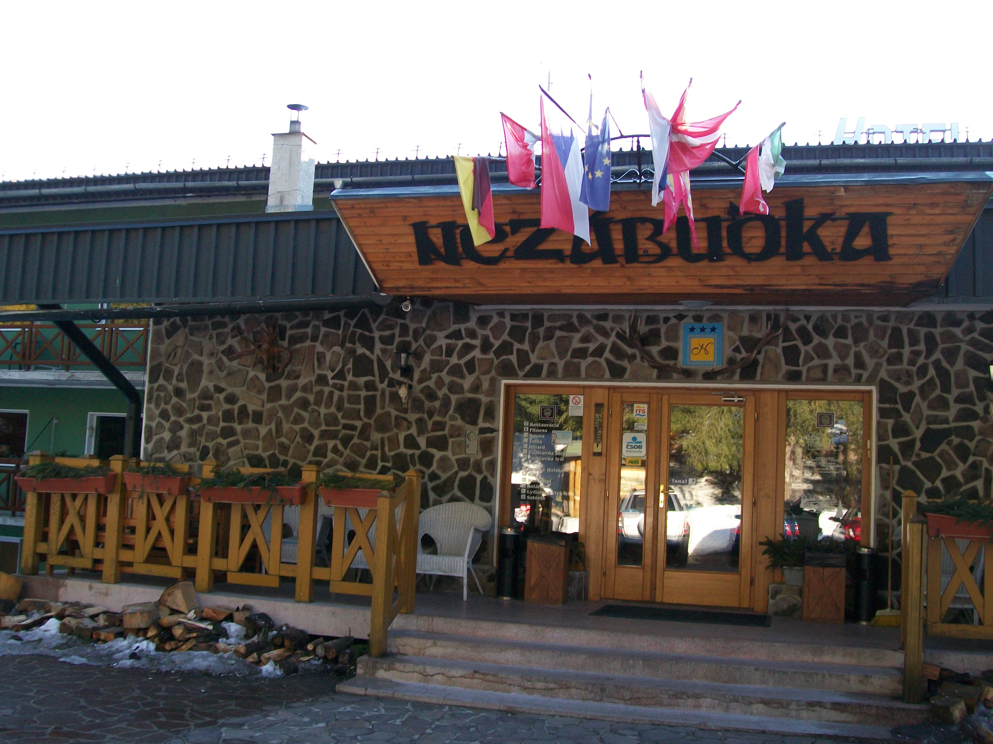 Vstup do hotela Nezábudka v Tatranskej Štrbe